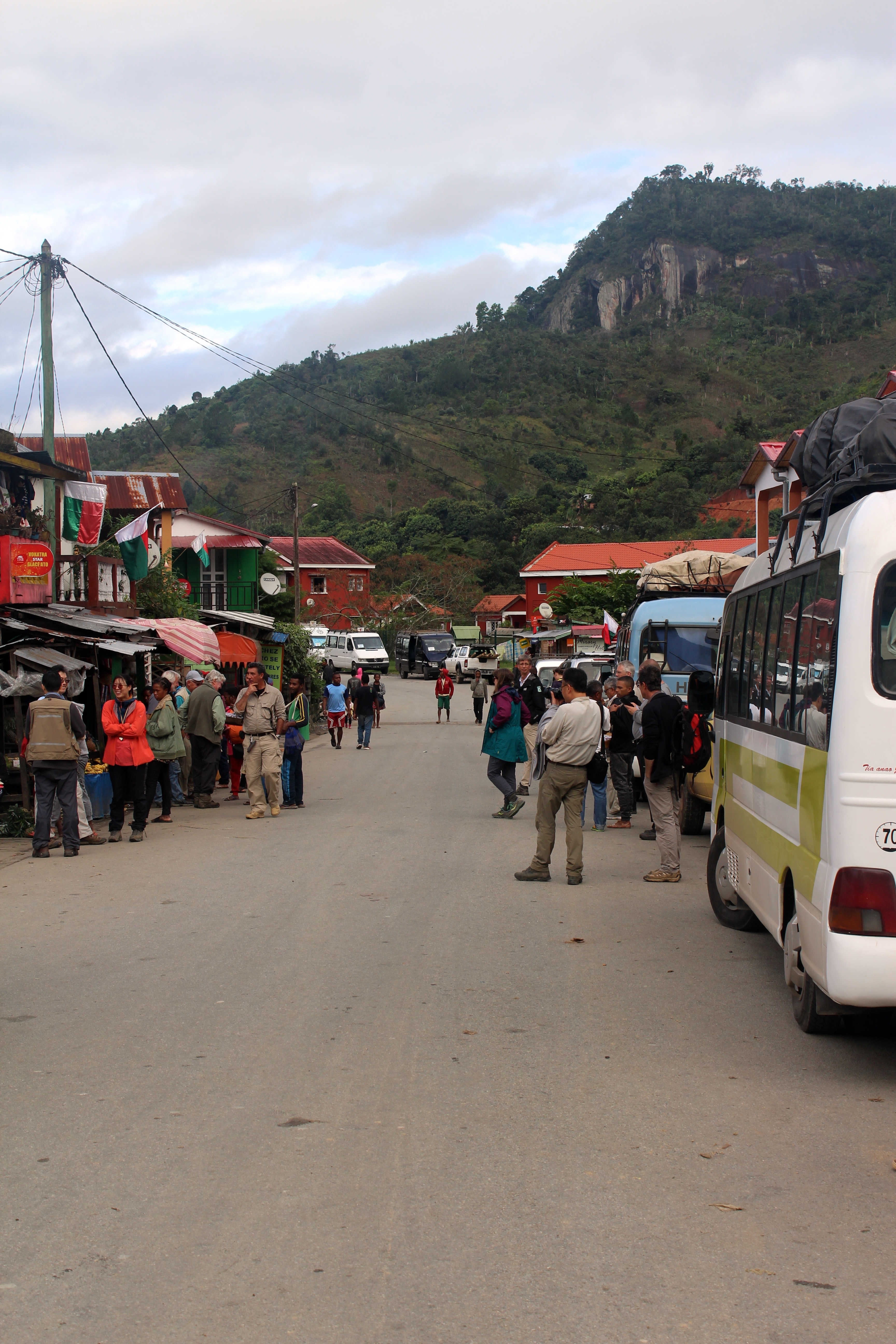 Nationalstrasse 25 (RN25) im Ortszentrum von Ranomafana, Blickrichtung nach Sued-Osten